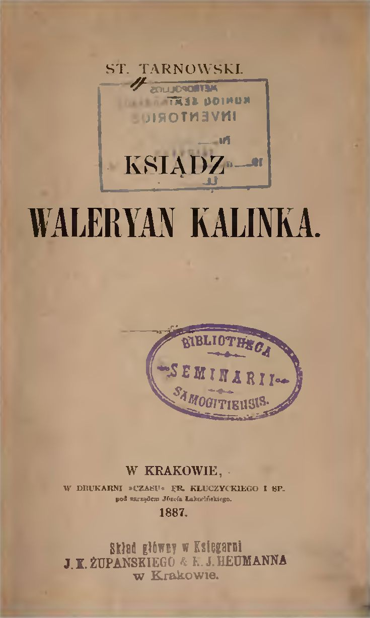 hrabia Stanisław Tarnowski, Stanislaw Tarnowski